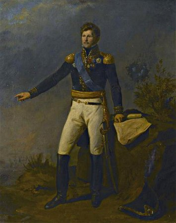 Julien Auguste Joseph Mermet (1772-1837), général de division et baron de l'Empire.